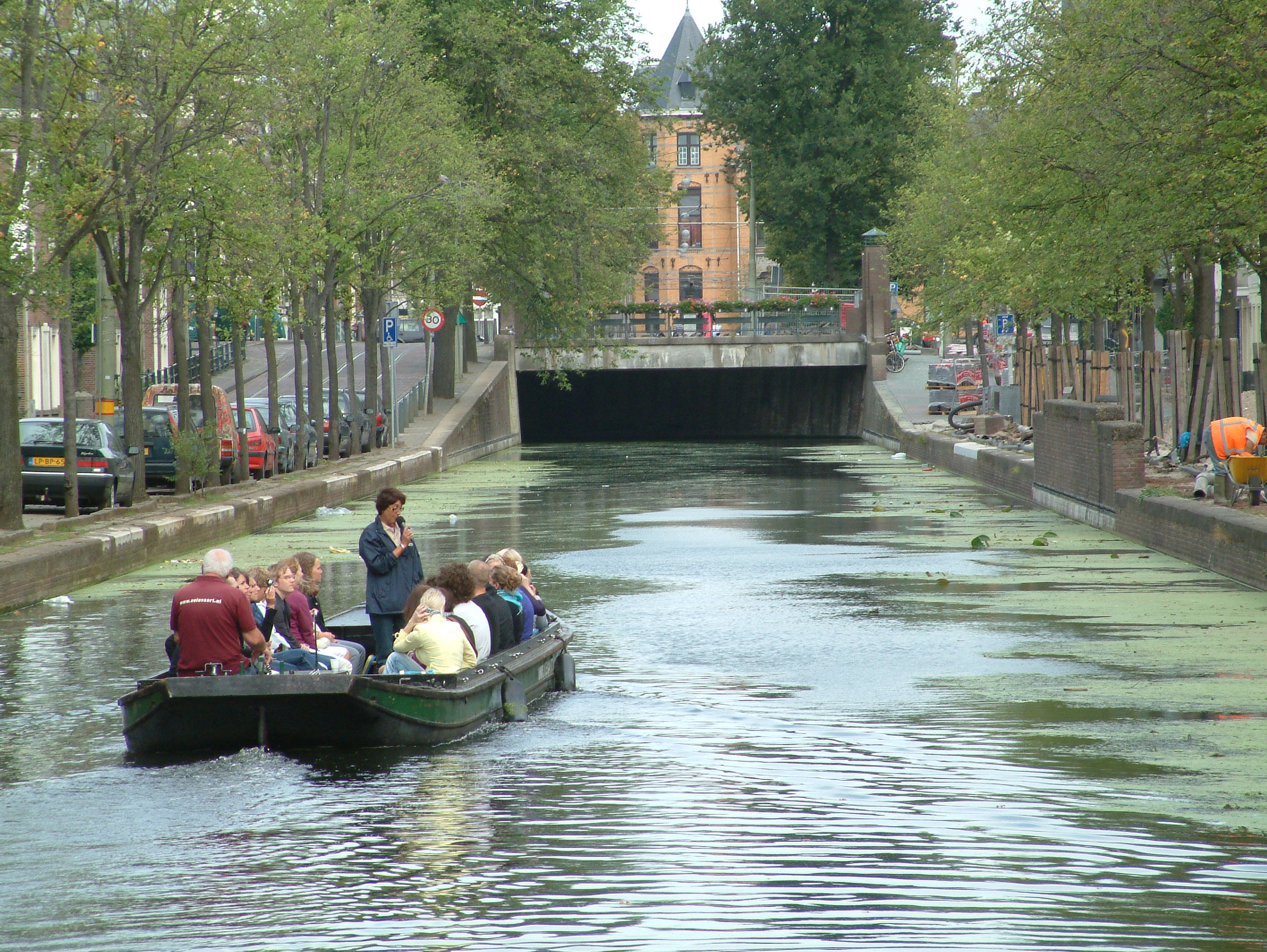 Brug in Den Haag